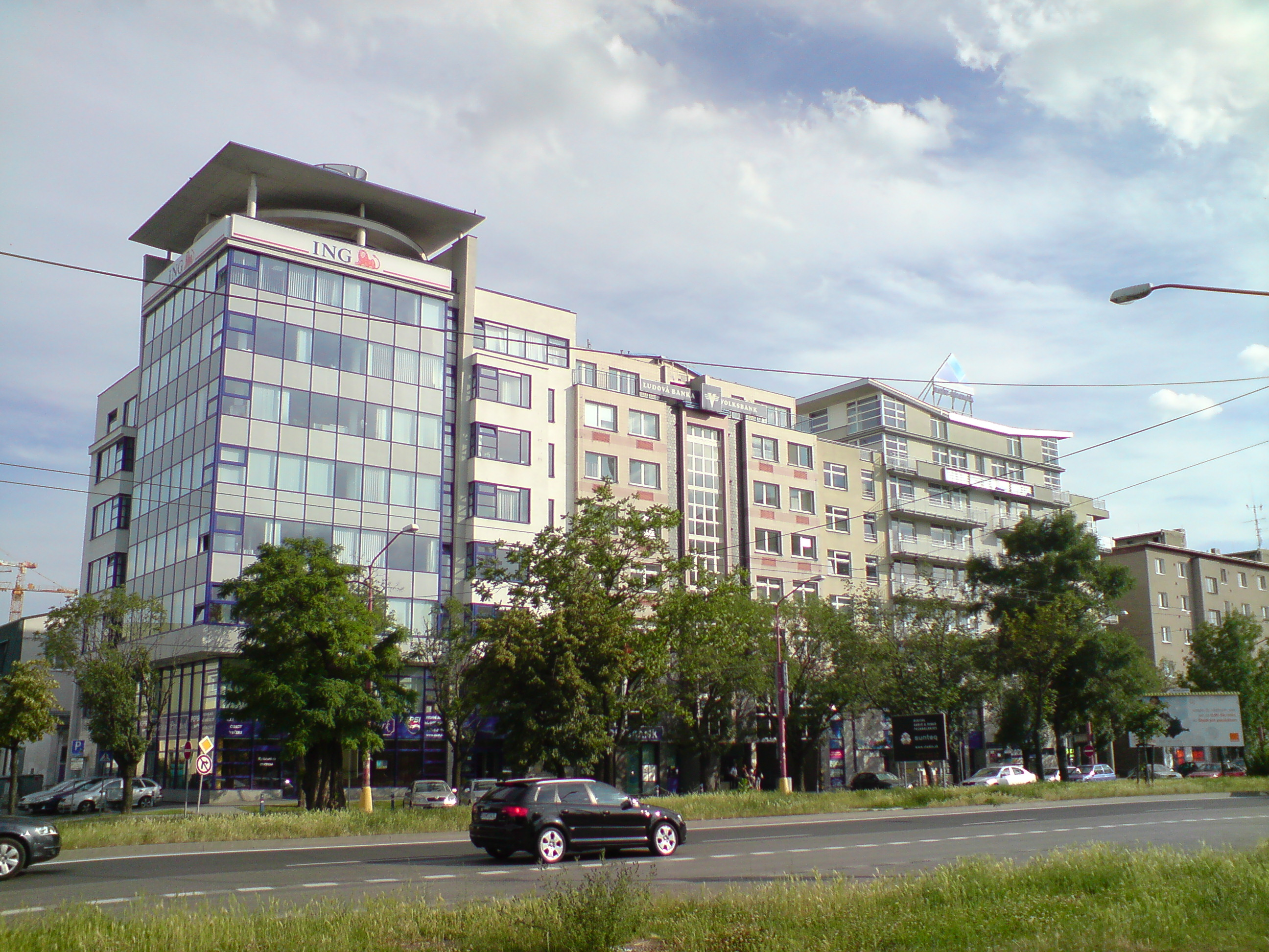 Trnavská, Bratislava